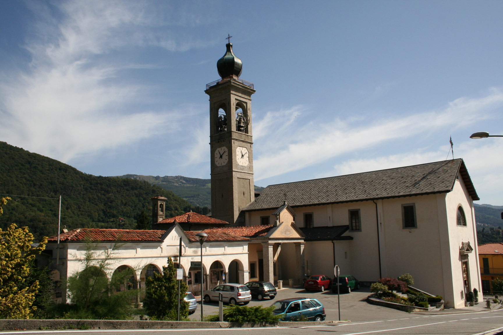 Valsecca, la Parrochiale.